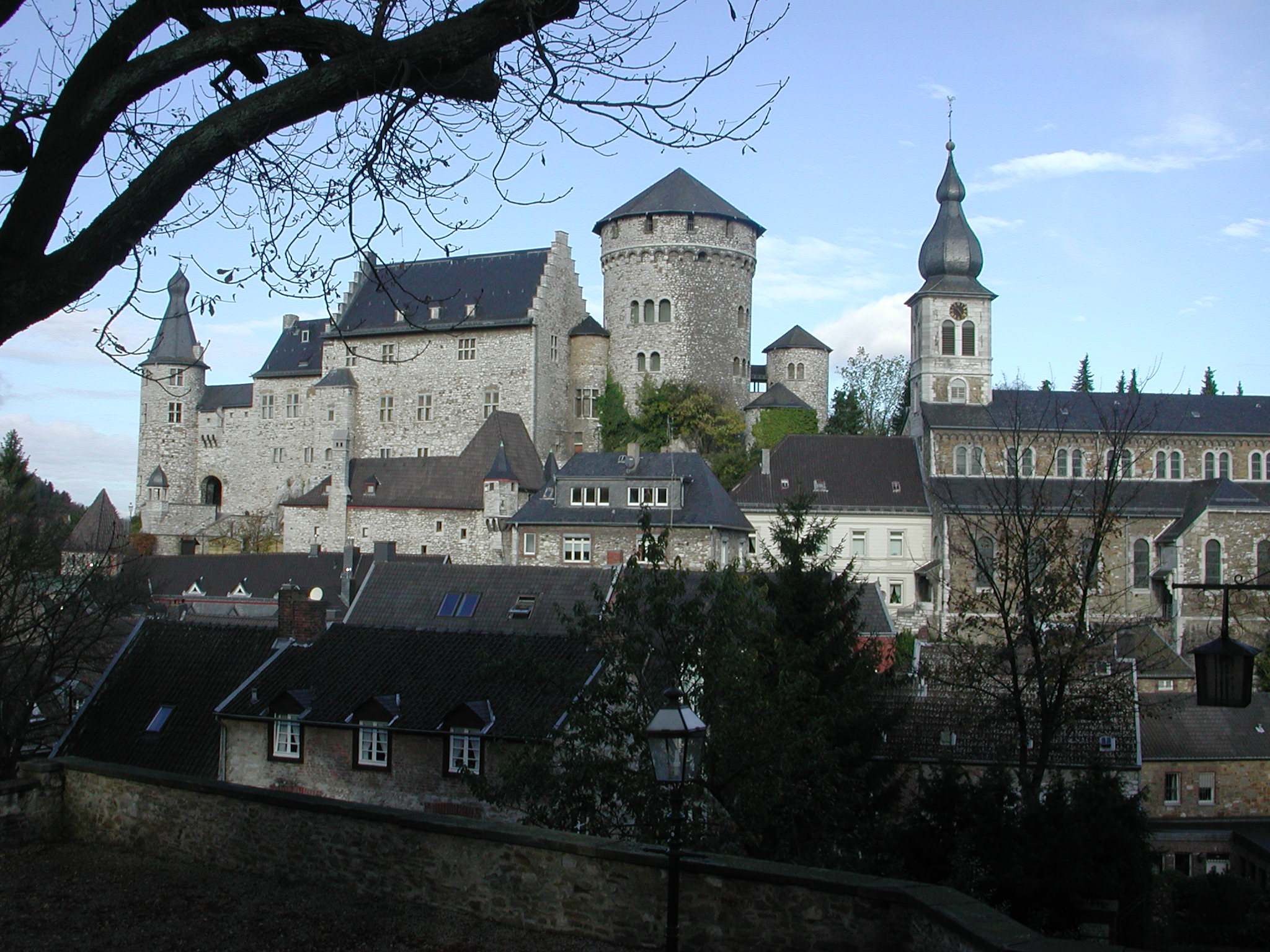 Burg Stolberg von Südosten